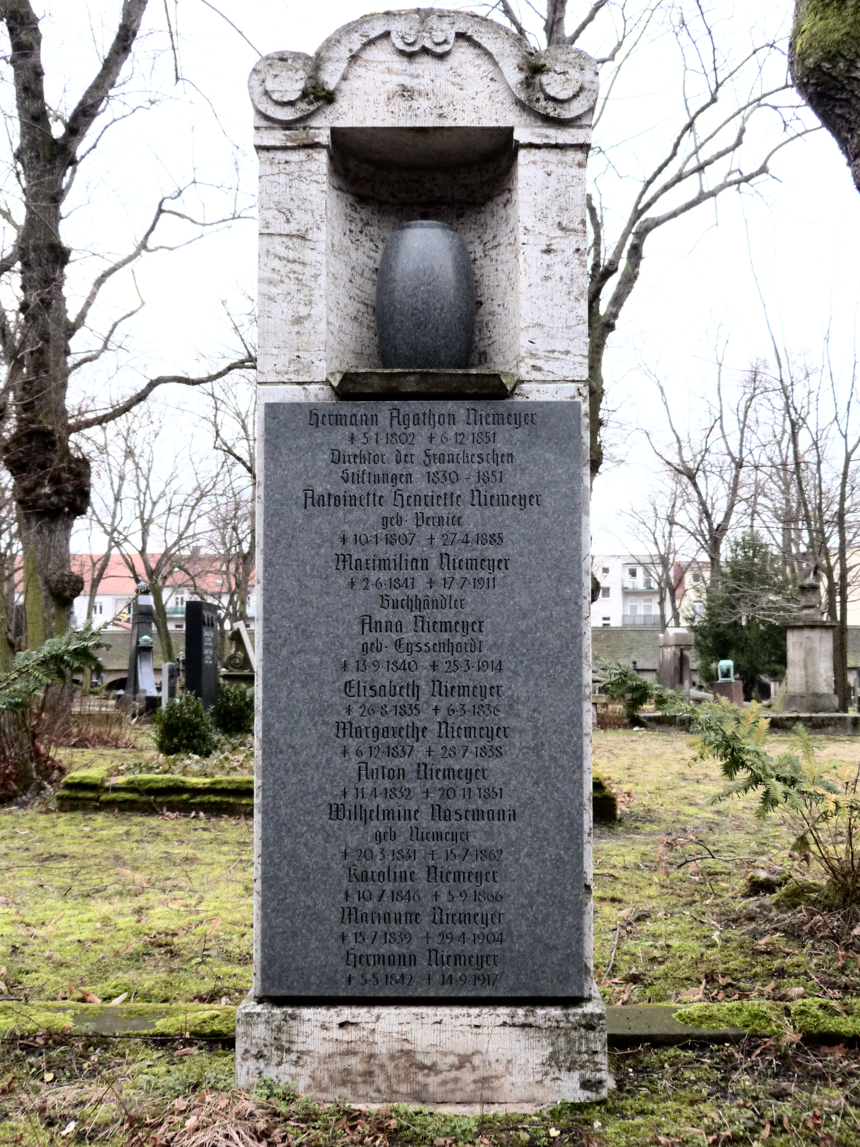 Familiengrab von Hermann Agathon Niemeyer, Stadtgottesacker Halle, Innenfeld I